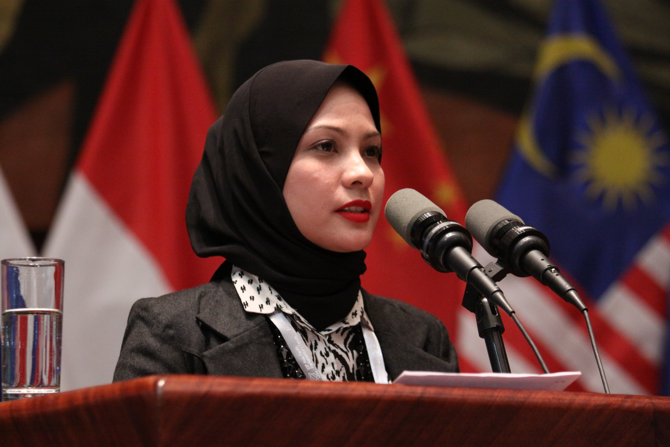 Quito, 13 enero de 2015.- Rachel Maryam Sayidina de la Delegación de Indonesia interviene en la Quinta sesión plenaria y situación internacional: Cooperación Regional en la región Asia Pacífico Fotografía: Hugo Ortiz / Asamblea Nacional